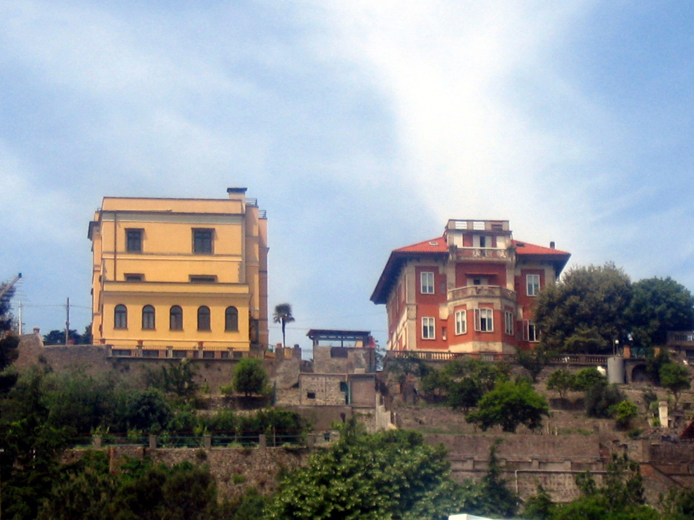 Castel Gandolfo, Lazio